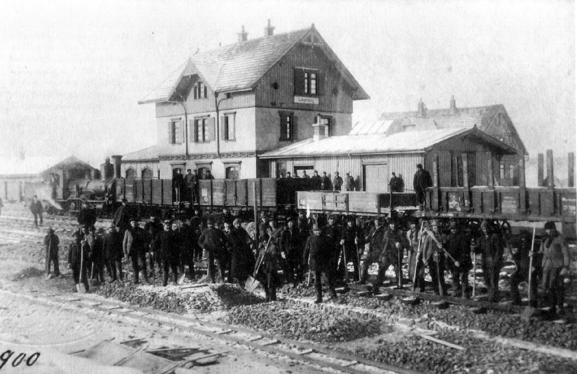 der Langenburger Bahnhof 1900, kurz nach Einweihung der Strecke Blaufelden–Langenburg.